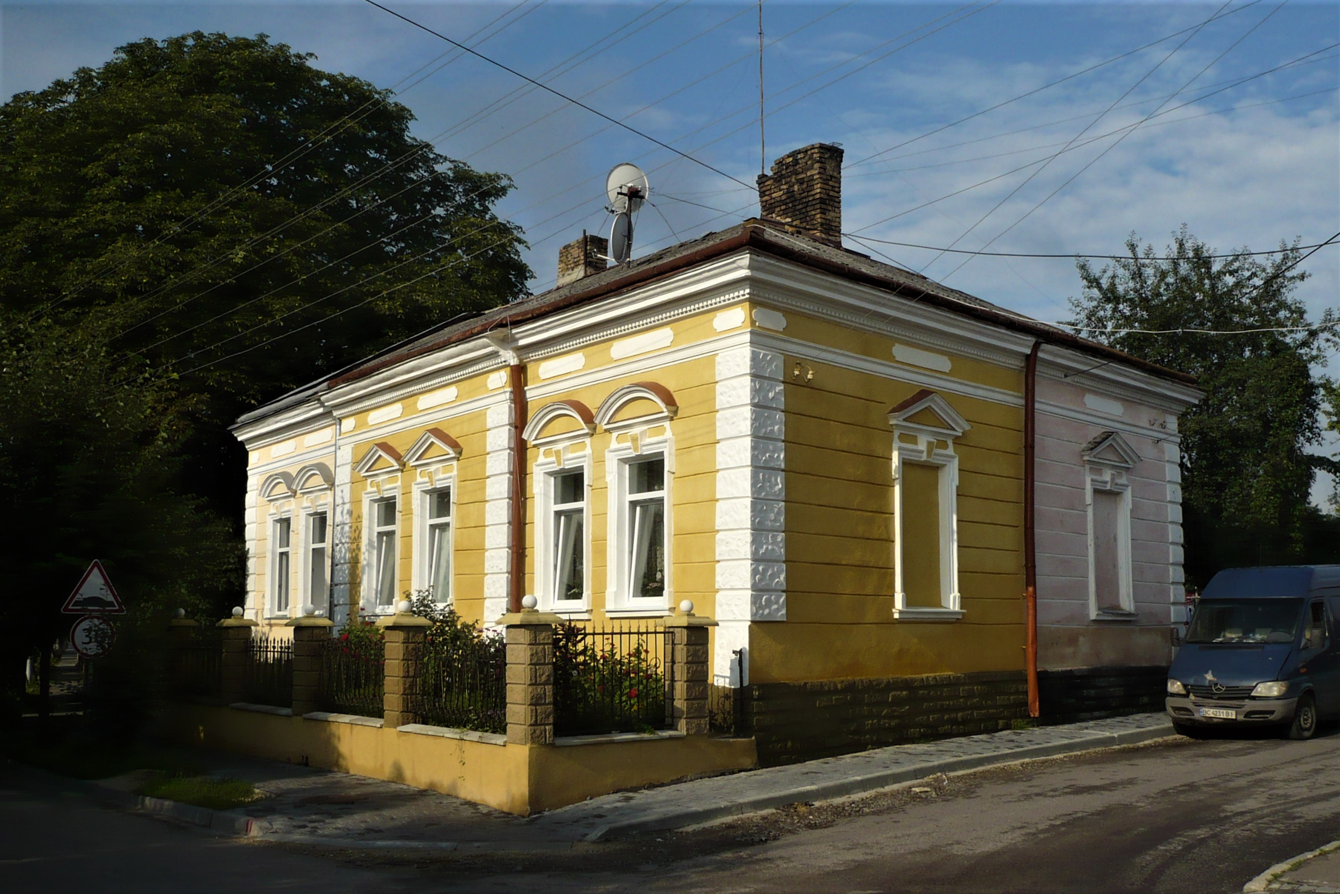 Dom w Złoczowie